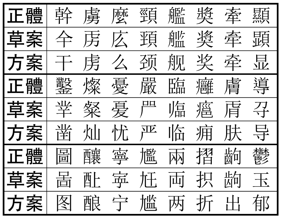 中國文字改革研究委員會1955年1月公佈的簡化字草案與1956年1月公佈的簡化字方案中，一部份簡化方法不同的字。草案各字取自《漢字簡化方案草案》的第一表〈798個漢字簡化表草案〉。（註：1956年的《漢字簡化方案》中，「臨」字的簡化字形與現行不同，第二畫是豎撇，故此其左旁與草案無異，現行的「临」字是在1964年公佈的《簡化字總表》中修改。此表「臨」字的方案簡化字依照現行者。）